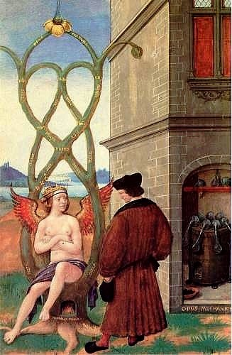 Miniature de Jean Perréal représentant une allégorie alchimique, extraite du manuscript Complainte de la Nature à l'alchimiste errant, de Pierre Sala. vers 1516.